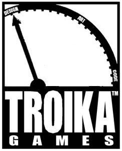 Troika Games logo